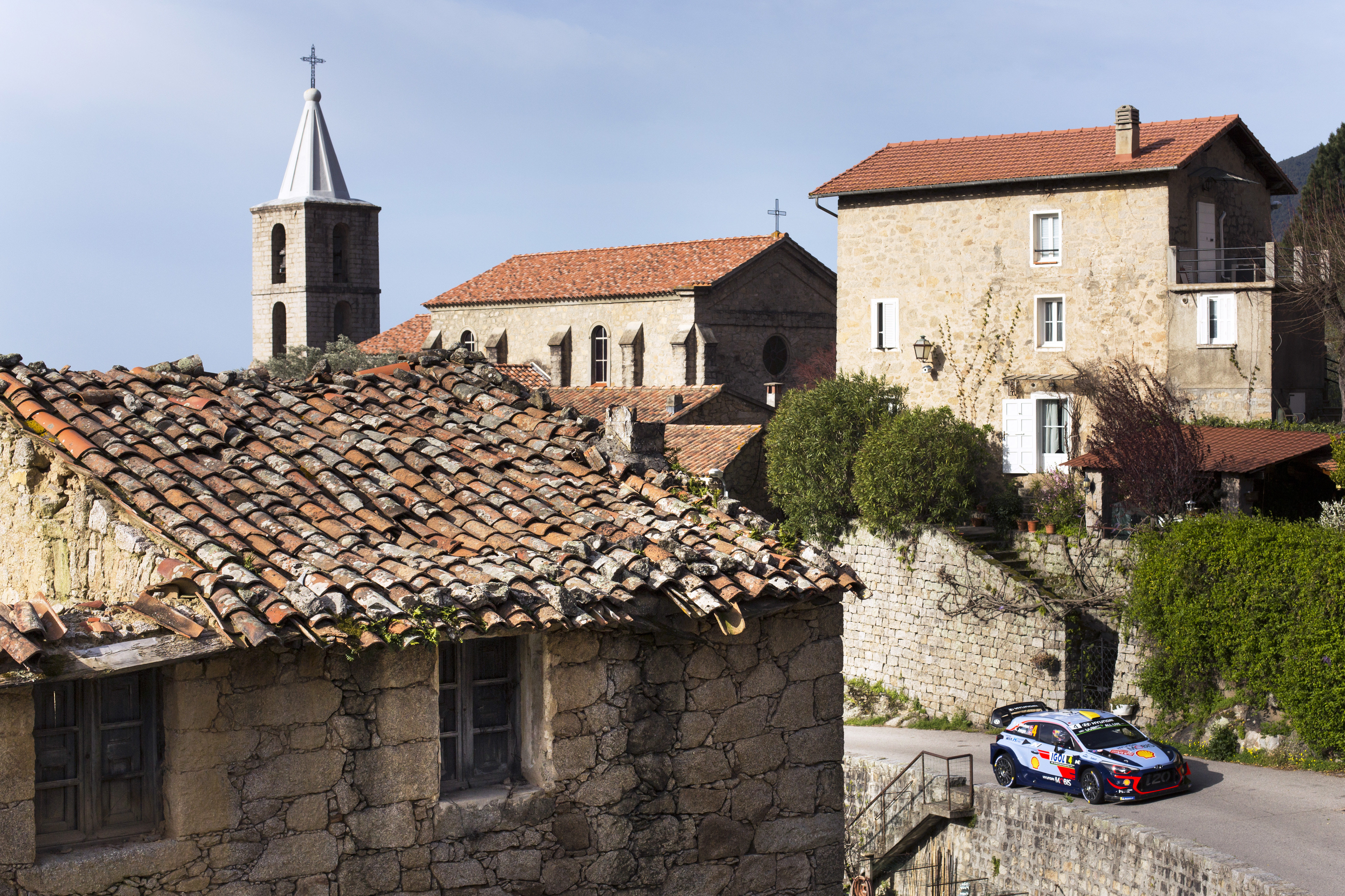 Rajd Korsyki 2018 Andreas Mikkelsen i Anders Jæger prowadzący Hyundaia i20 Coupe WRC